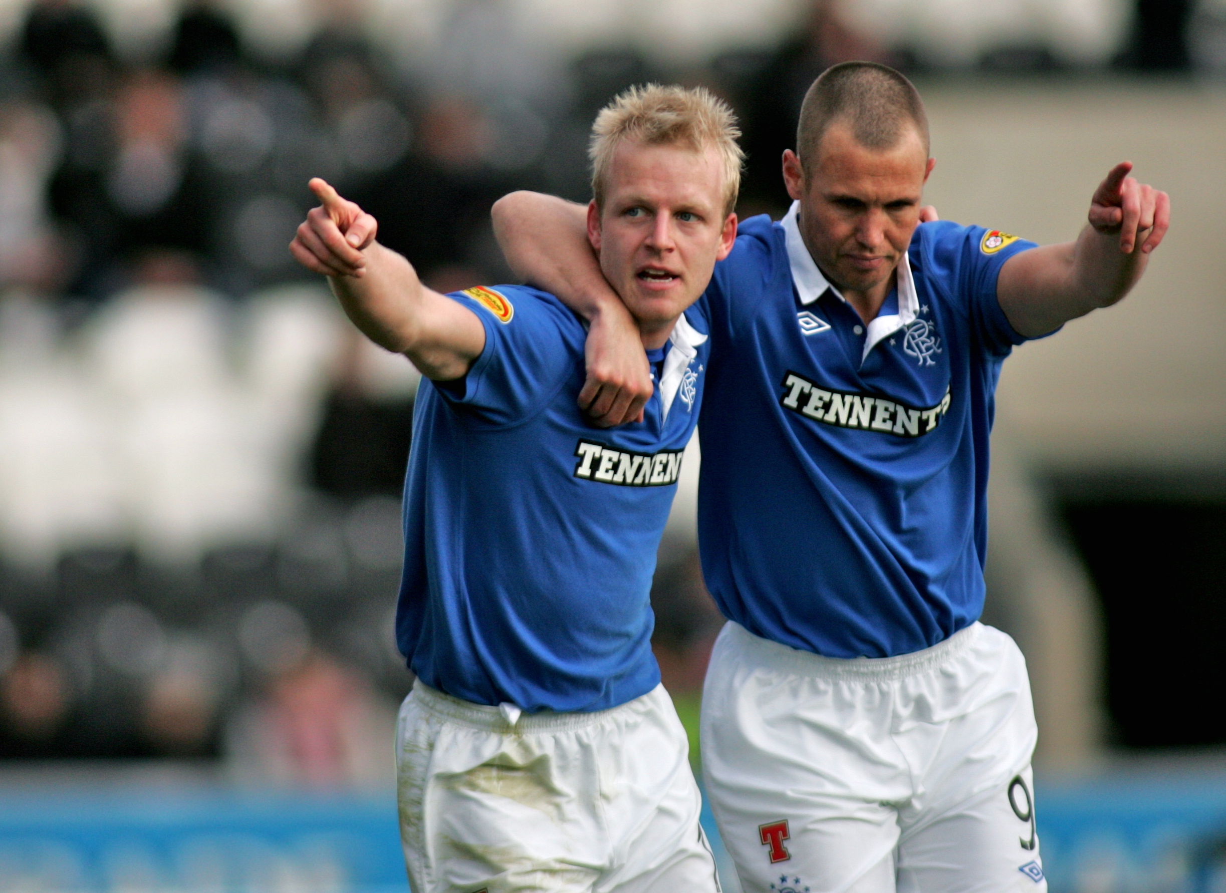 HI7Y0247